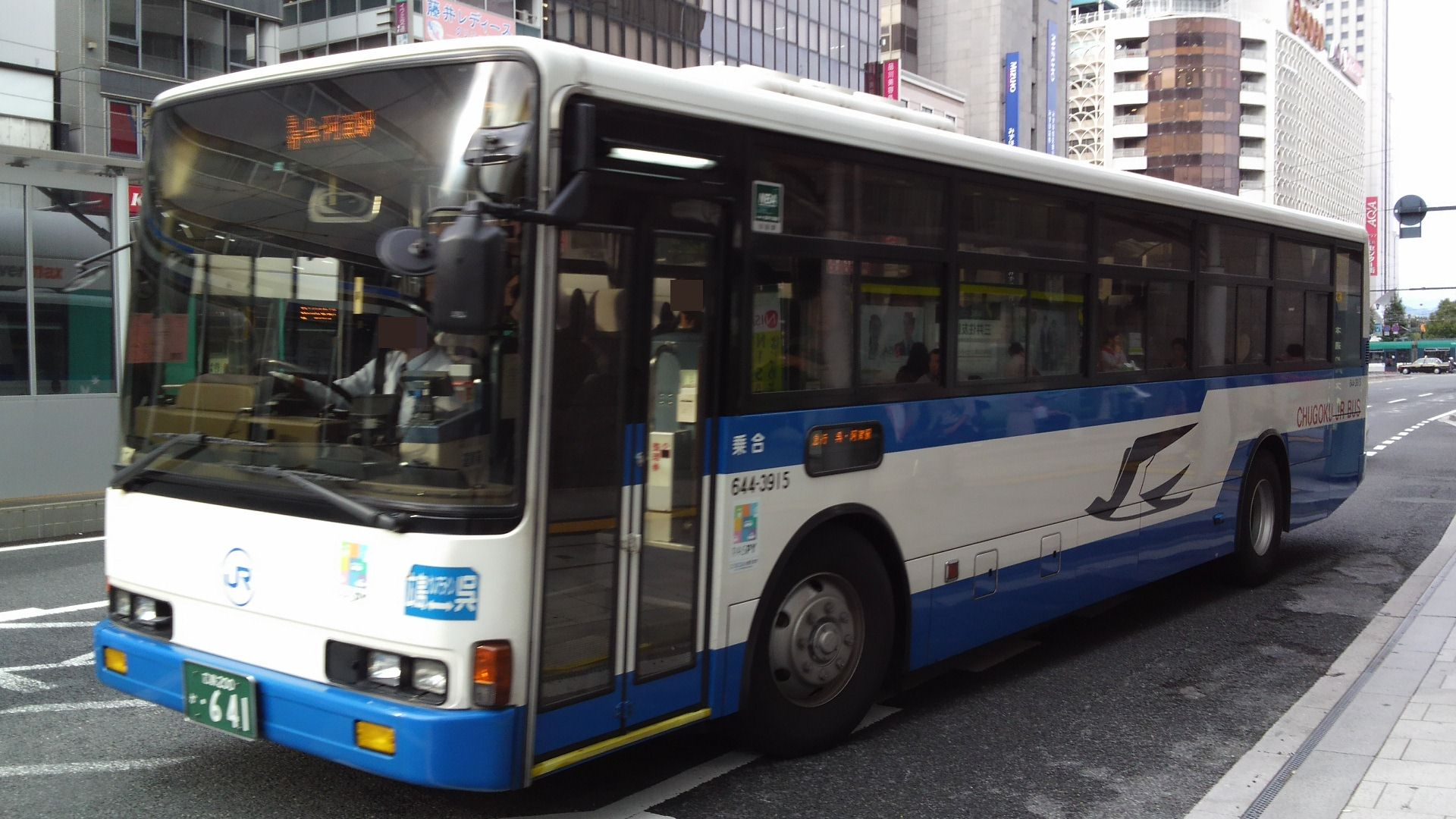 三菱ふそう・エアロスター 準高速バス仕様